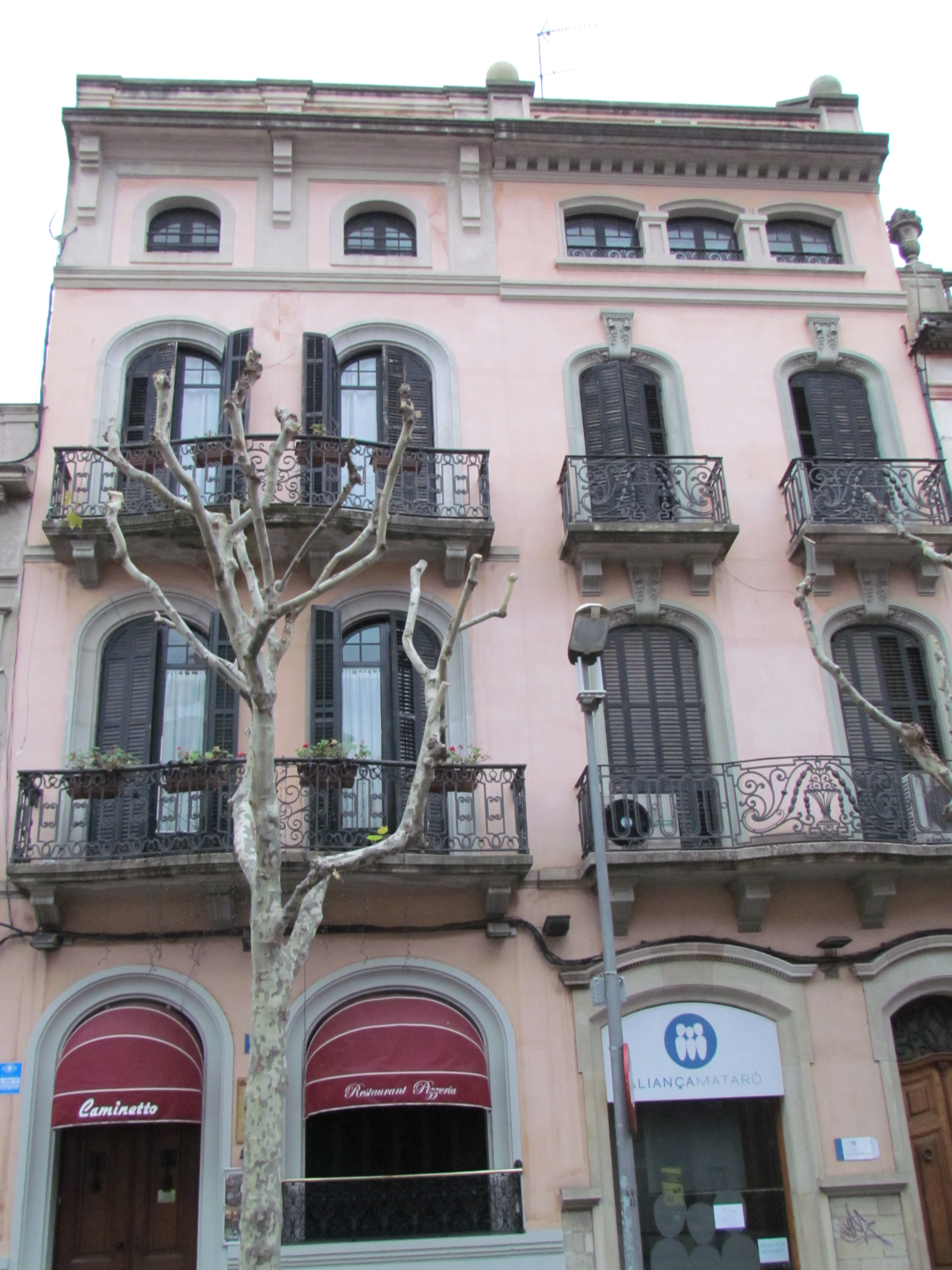 Vista de la Façana de Can Martí Pasqual. (Mataró, el Maresme)